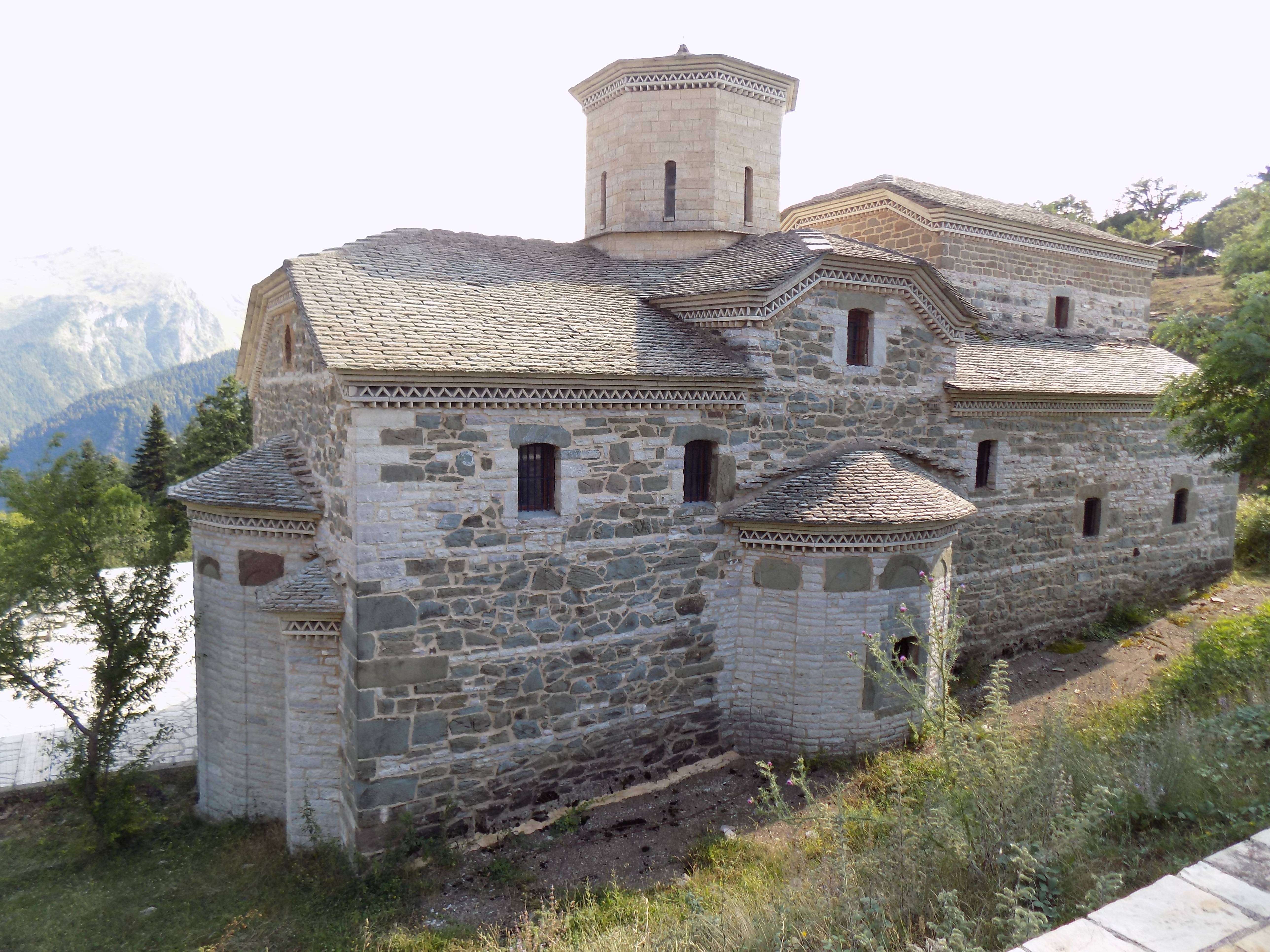 Ναός Αγ. Παρασκευής Νεραϊδοχωρίου«Ναός Αγ. Παρασκευής Νεραϊδοχωρίου»